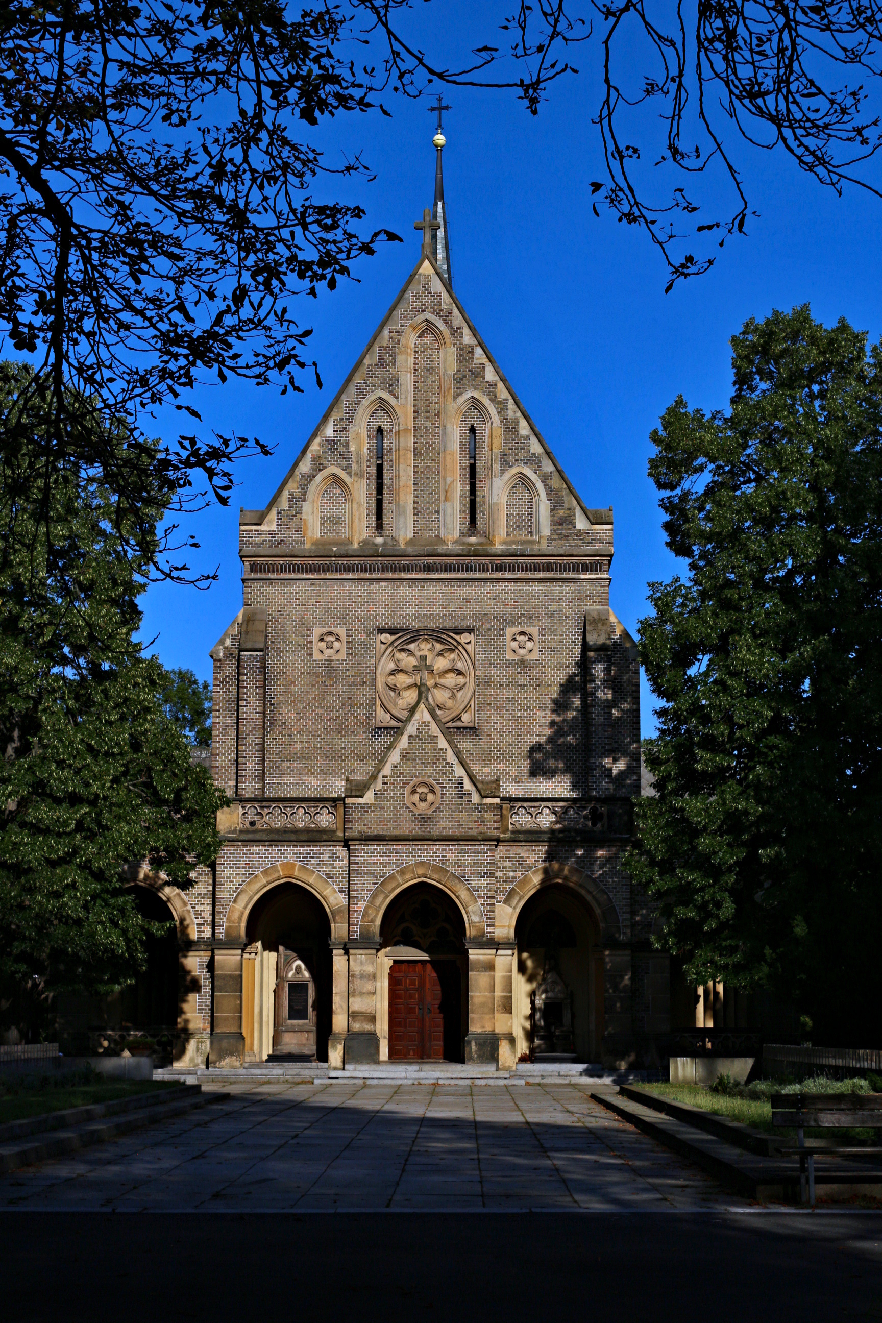 Kaple sv. Václava na Vinohradském hřbitově